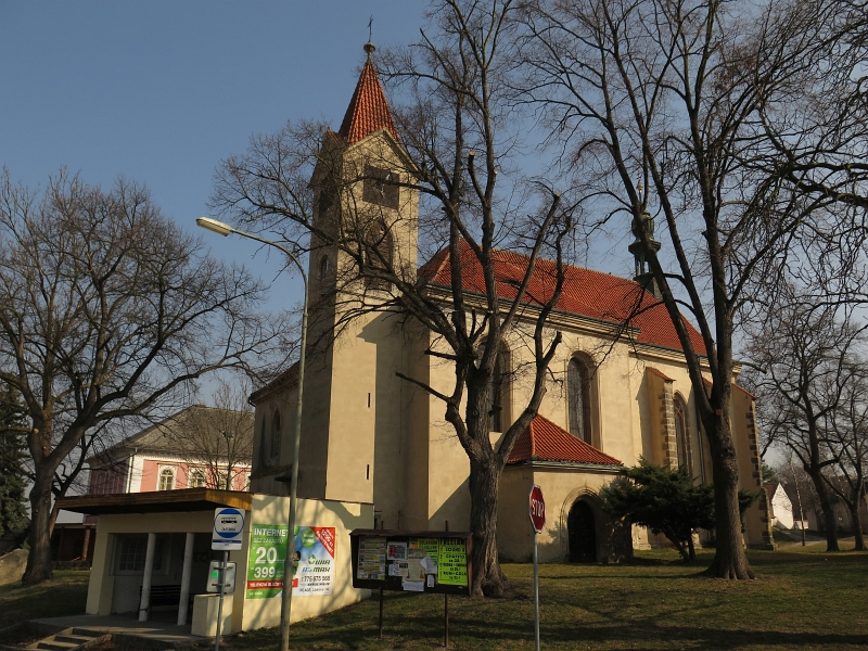 Kostel svatého Jakuba Většího, Vetlá.